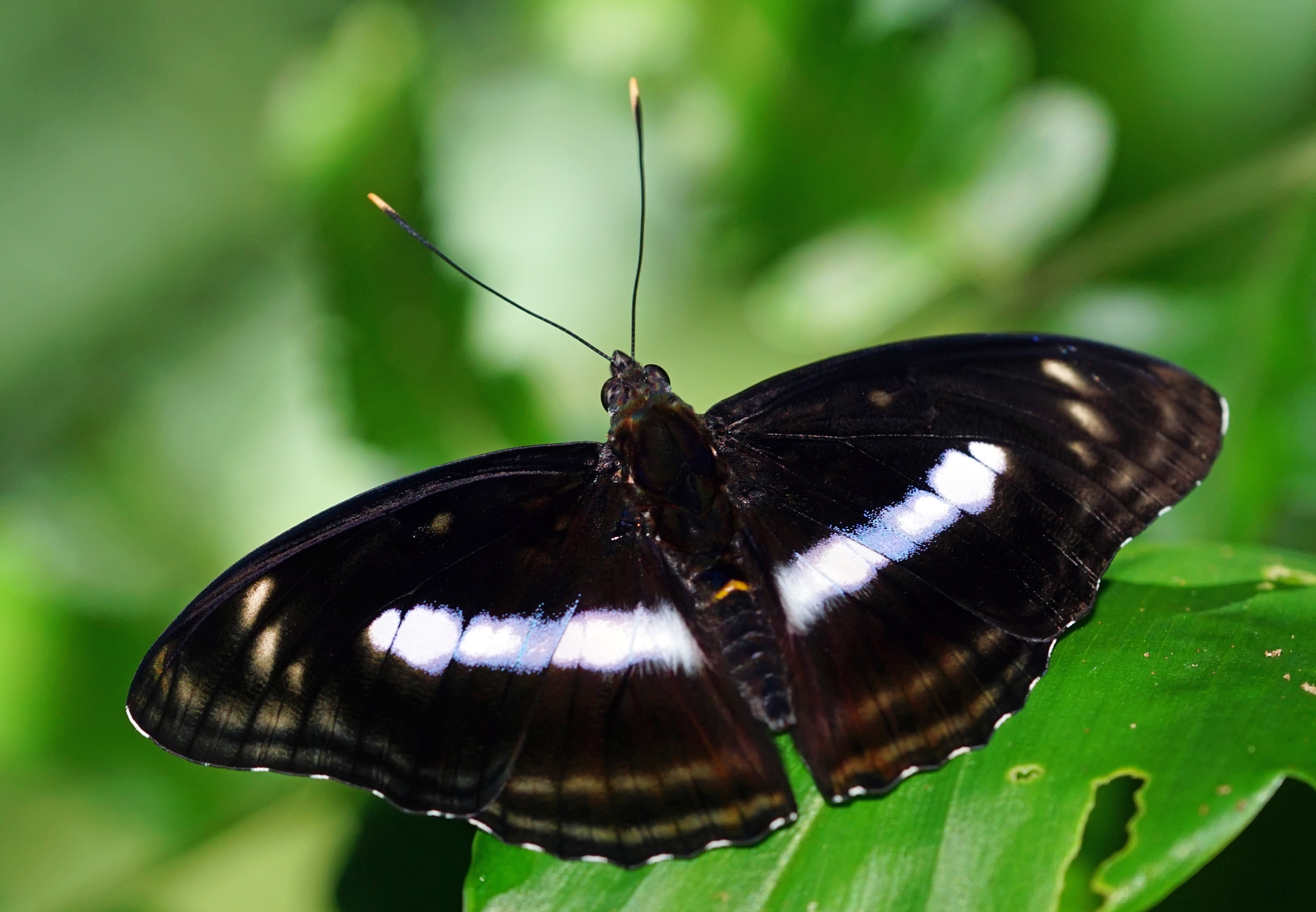 異紋帶蛺蝶 Athyma selenophora laela